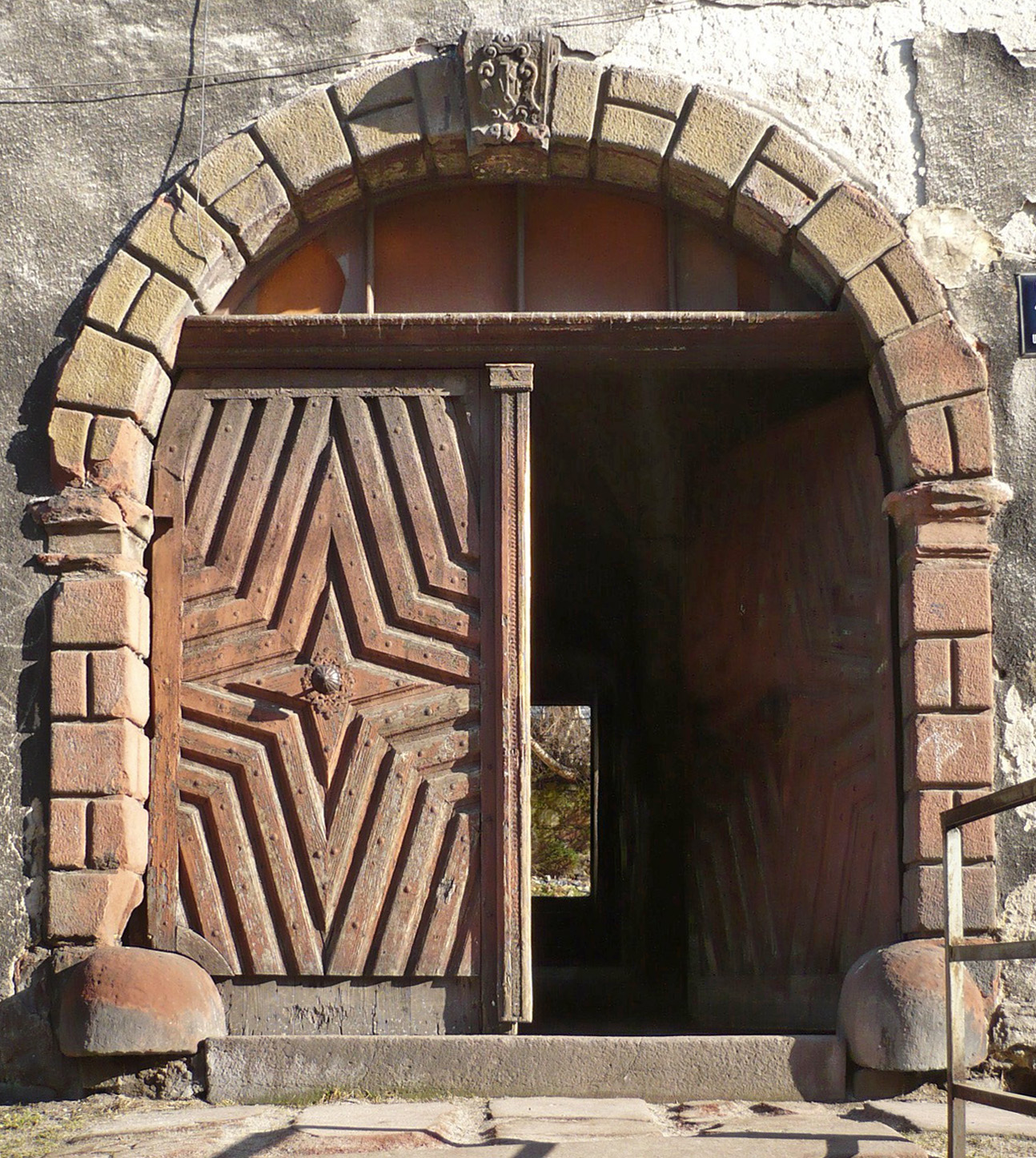 Nowa Ruda, ul. Kościelna 12 - dom, brama